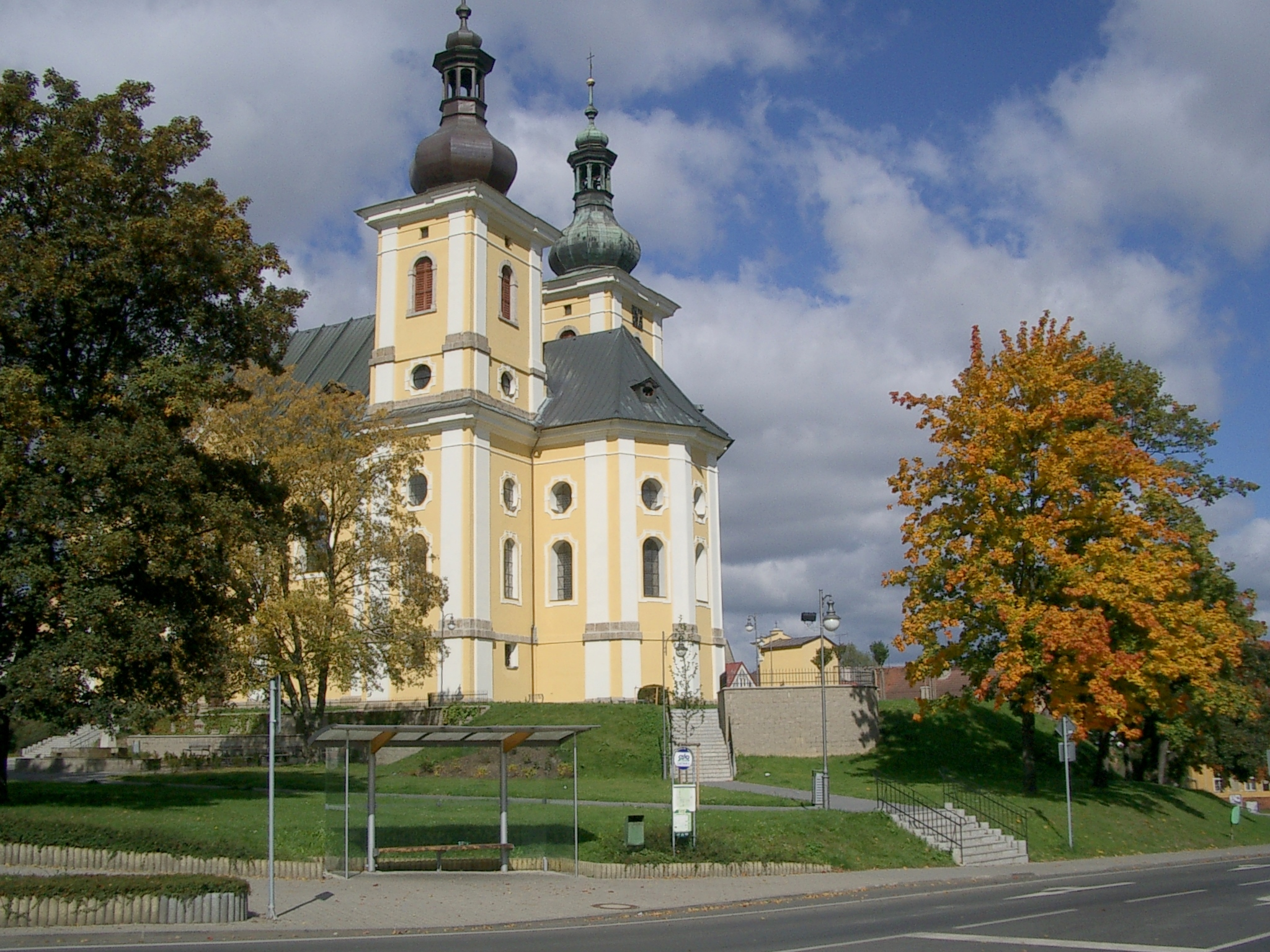 Pfarrkirche Mariä Himmelfahrt in Kynšperk nad Ohří